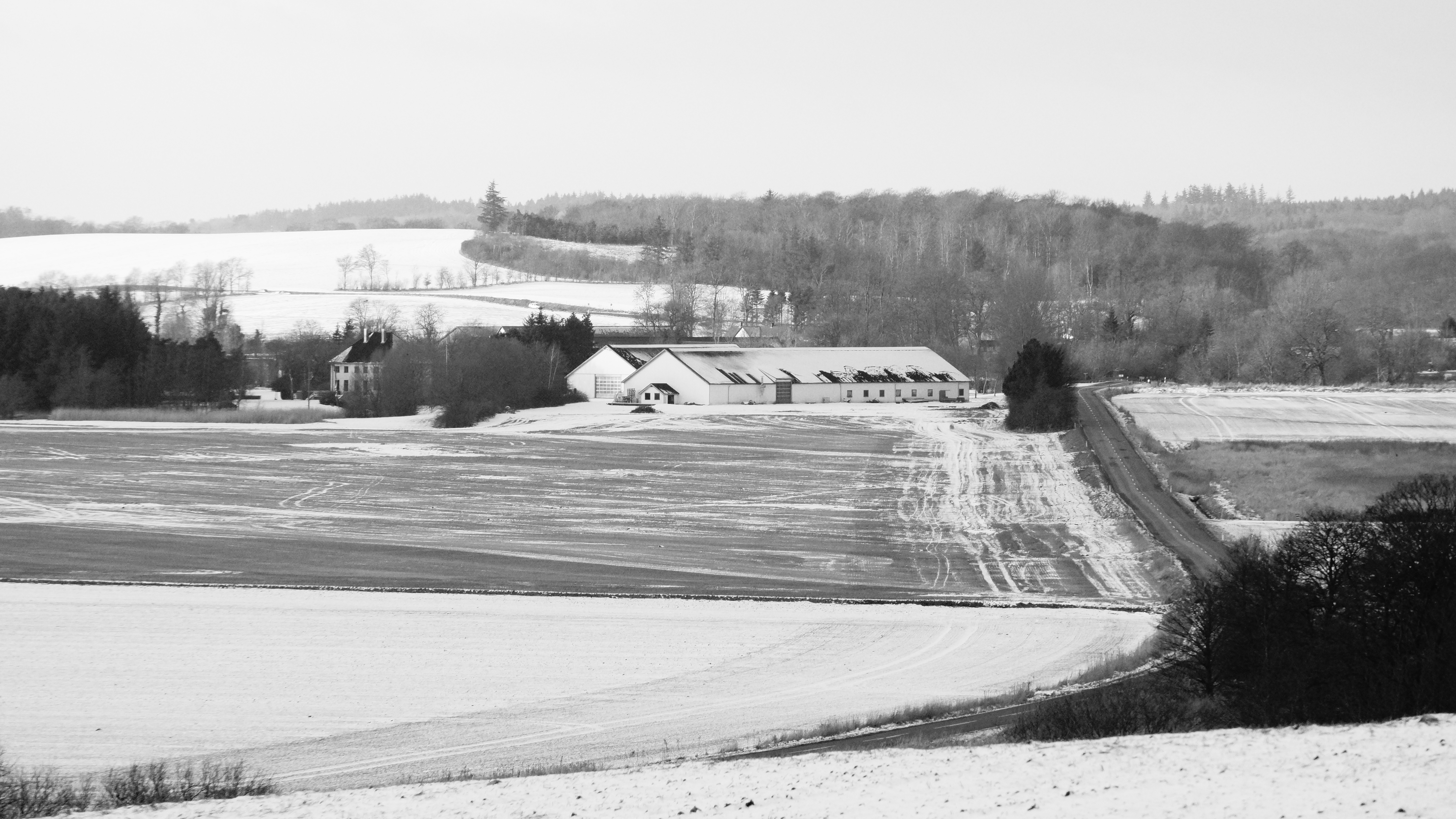 Landsbyen Fannerup på Djursland set i retning nord hen over Kolindsund fra Fævejlevej.